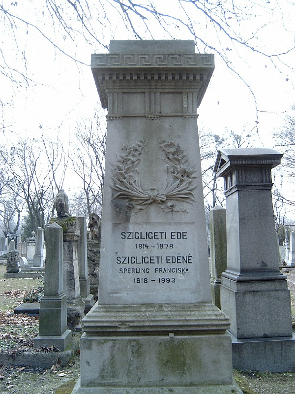 Szigligeti Ede sz.: Szathmáry József (1814. március 18.- 1878. január 19.)színész, rendező, drámaíró, fordító, szakíró, színigazgató és felesége, Szigligetiné Sperling Franciska (1817–Bp., 1893. júl. 14.) színésznő sírja Budapesten. Kerepesi temető: 34/1-1-30.